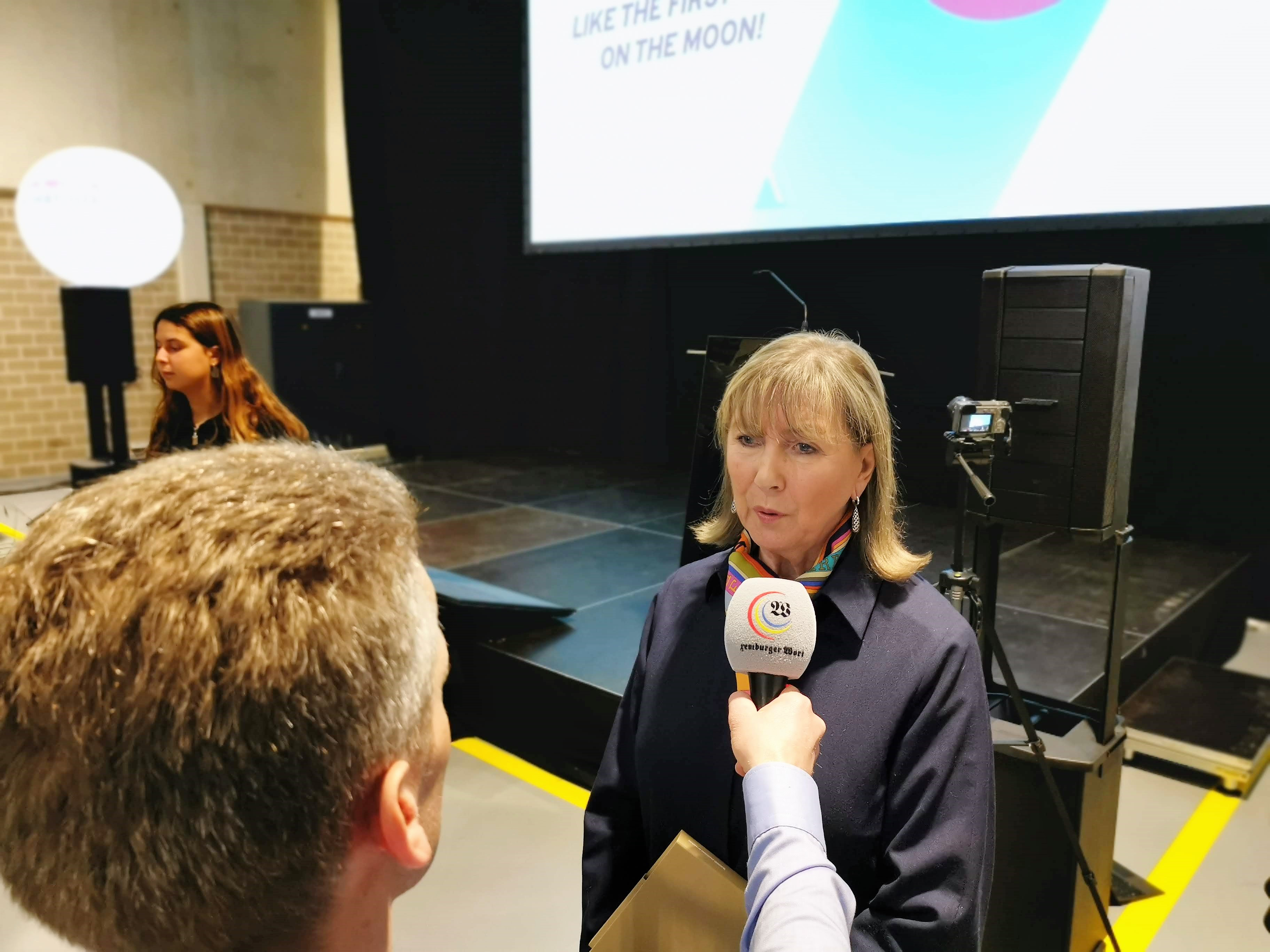 D'Stater Buergermeeschtesch, Lydie Polfer, op der Pressekonferez iwwert de gratis ëffentlechen Transport zu Lëtzebuerg.